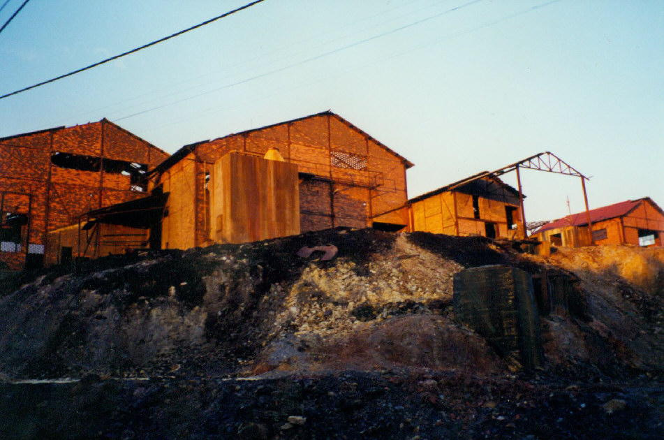 Lousal